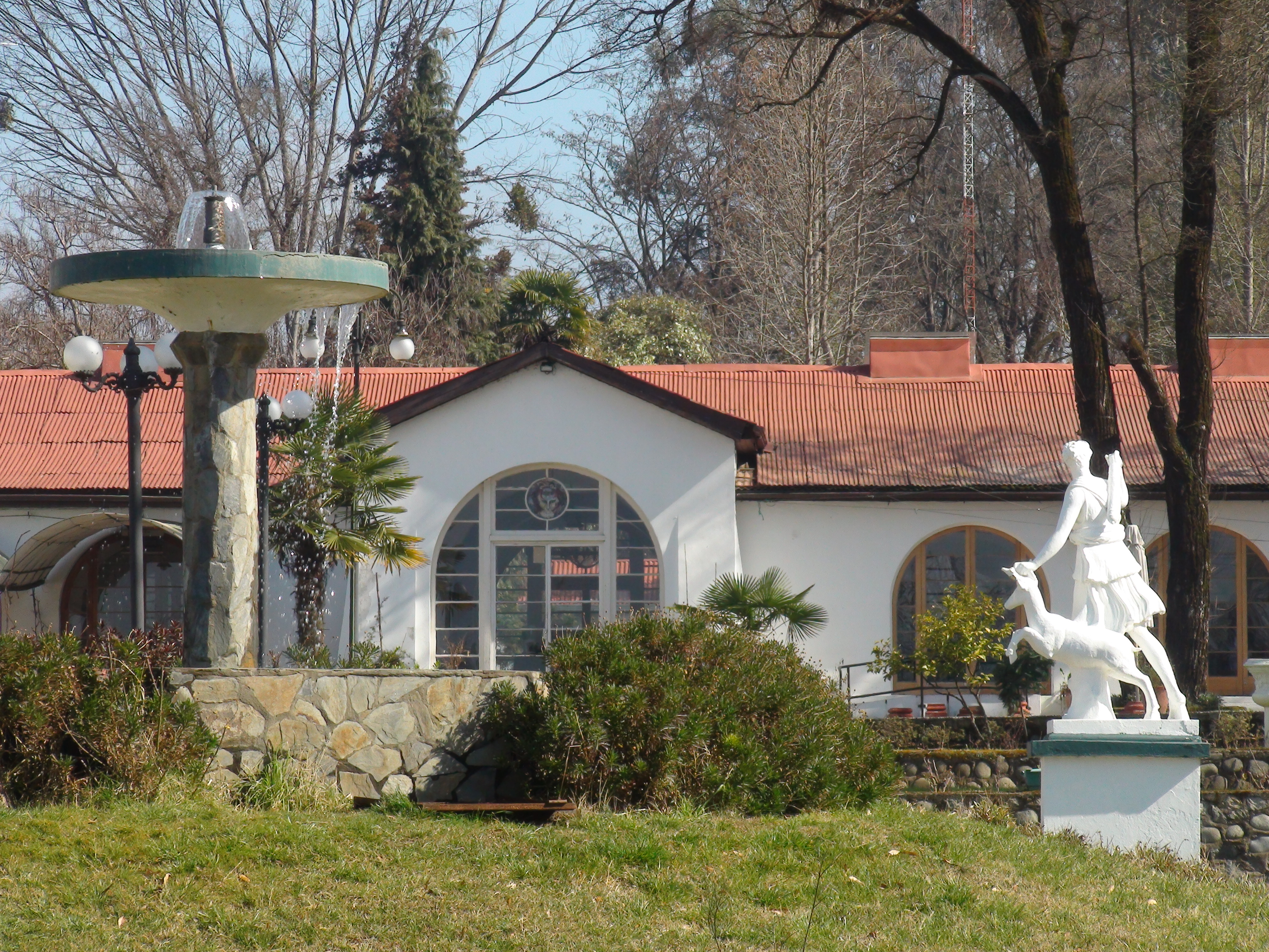 Vista de la fachada del hotel en Termas de Panimávida, comuna de Colbún, Provincia de Linares, Región del Maule, Chile.